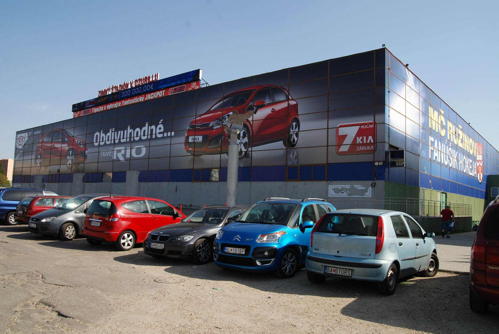 Zimný štadión Vladimíra Dzurillu